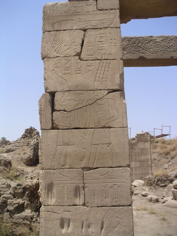 Relief représentant le pharaon Psammétique III - Chapelle des divines adoratrices Nitocris Ire et Ânkhnesnéferibrê à Karnak - XXVIe dynastie égyptienne